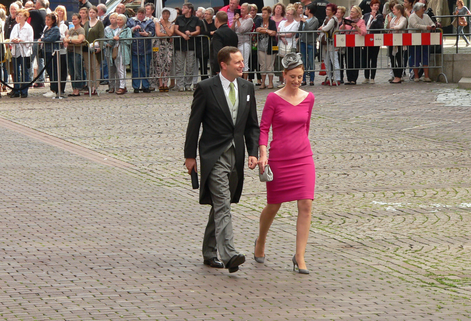 Hochzeitsgäste Georg Friedrich Prinz von Preußen und Ehefrau Sophie Prinzessin von Preußen vor der Marktkirche bei der Hochzeit von Ekaterina Malysheva und Ernst August von Hannoverg